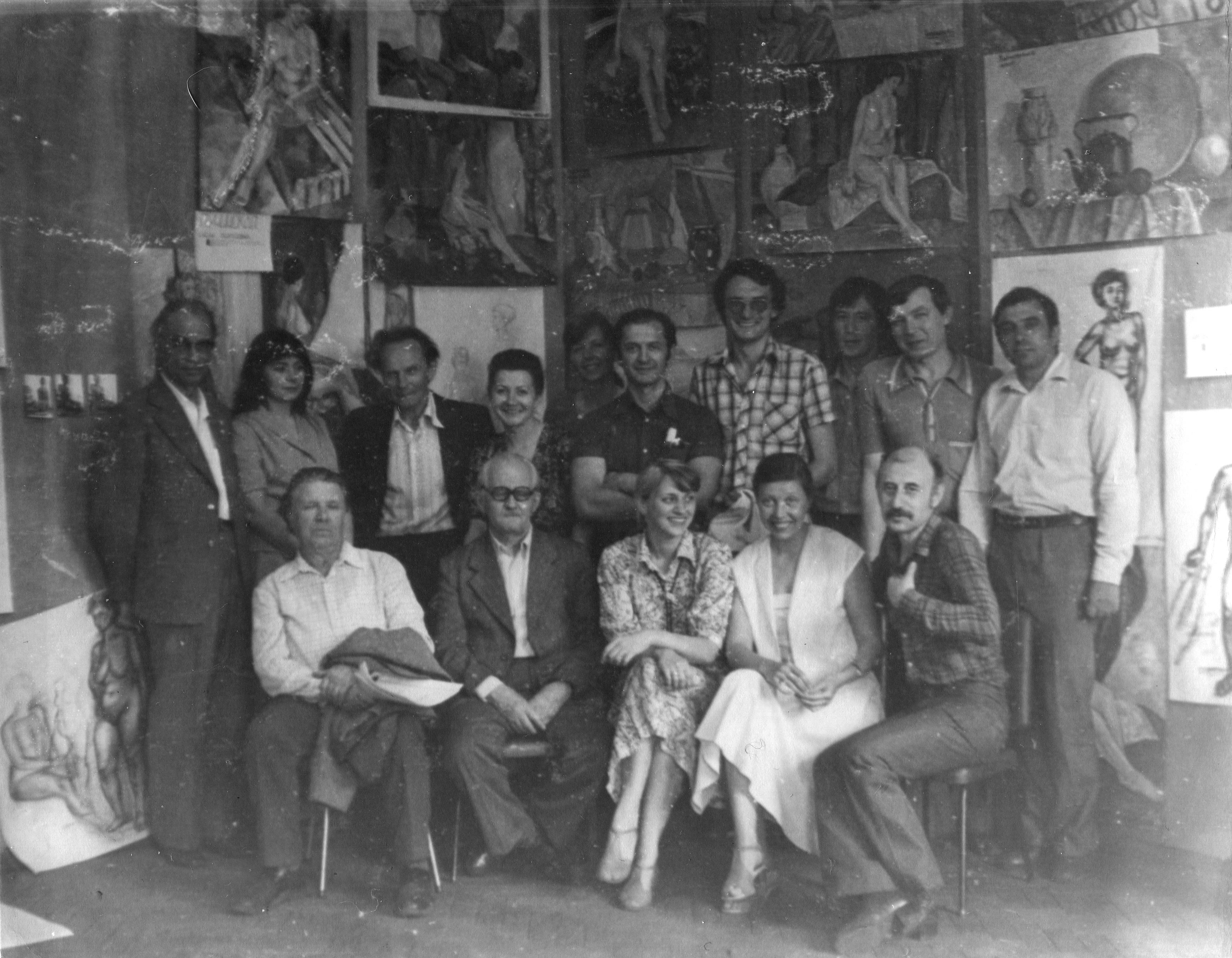 Просмотр (отчет) работ преподавателей художественных ВУЗов СССР [Прим. 09]. Факультет повышения квалификации МВХПУ, 1981. Слева направо первый ряд: Д.К. Тегин (профессор кафедры академической живописи МХВПУ), Ф.Ф. Волошко (профессор кафедры академического рисунка МХВПУ), И.А. Сергеева (Москва), И. Телепнева (Свердловск), А.Г. Серчемелидзе (Тбилиси). Второй ряд: М.А. Щербаков (декан ФПК МХВПУ), Т.И. Лесневская (Махачкала), П.А. Пелетевский (проректор по науке МХВПУ), Н.Ю. Шевелина (Свердловск), Л. Пучинская (Свердловск), Е.А. Колоколов (Омск), И. Копыстенский (Новосибирск), Г.В. Павлов (Омск), Г.М. Ходосов (Воронеж).